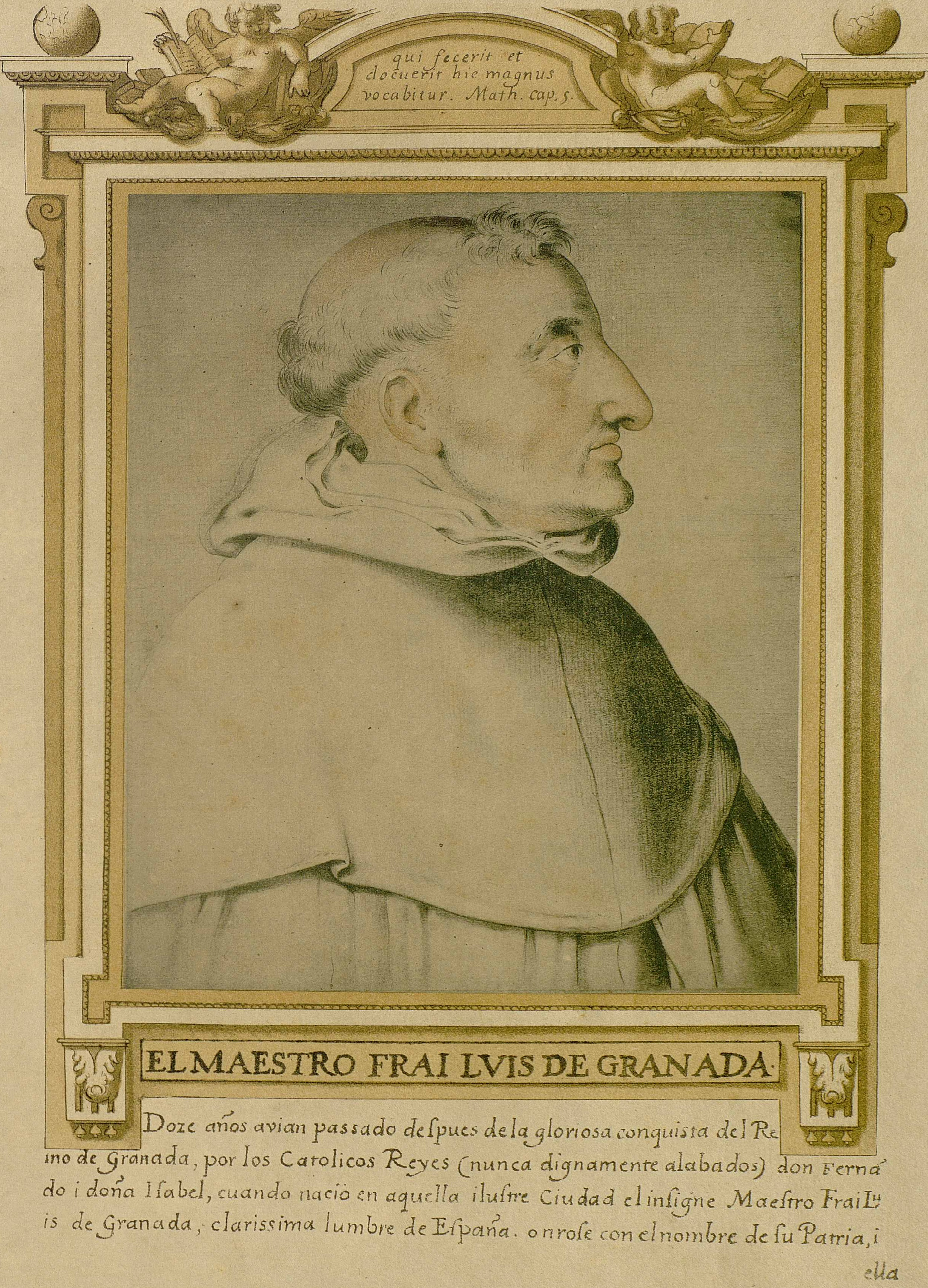 Fray Luis de Granada, Libro de descripción de verdaderos retratos de ilustres y memorables varones, Madrid, Biblioteca de la Fundación Lázaro Galdiano